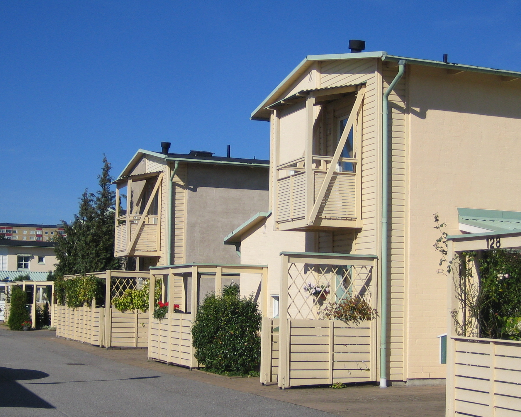 Gullviksborg, Malmö, Sweden